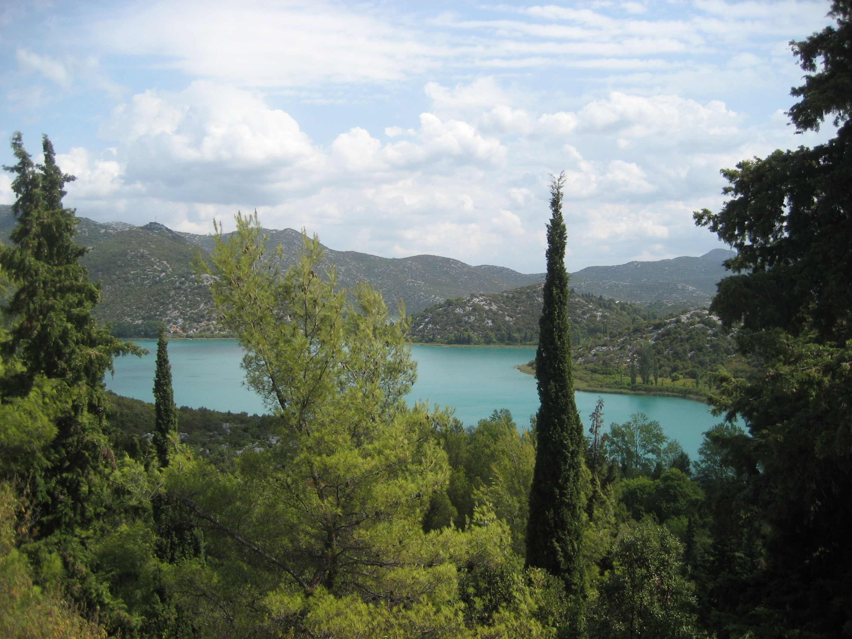 Bacinska Jezera, Croatia, lake in karst topography.